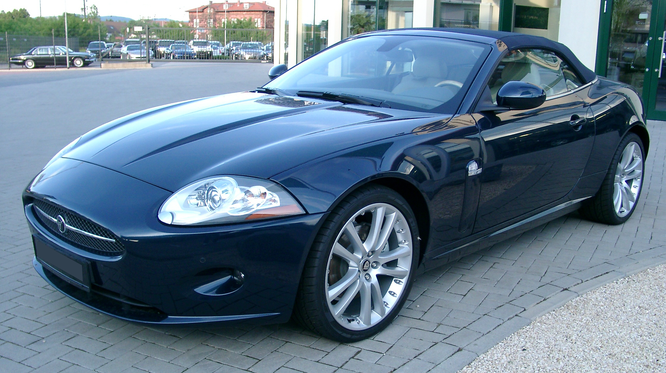 Jaguar_X150, 2006-er Version des XK